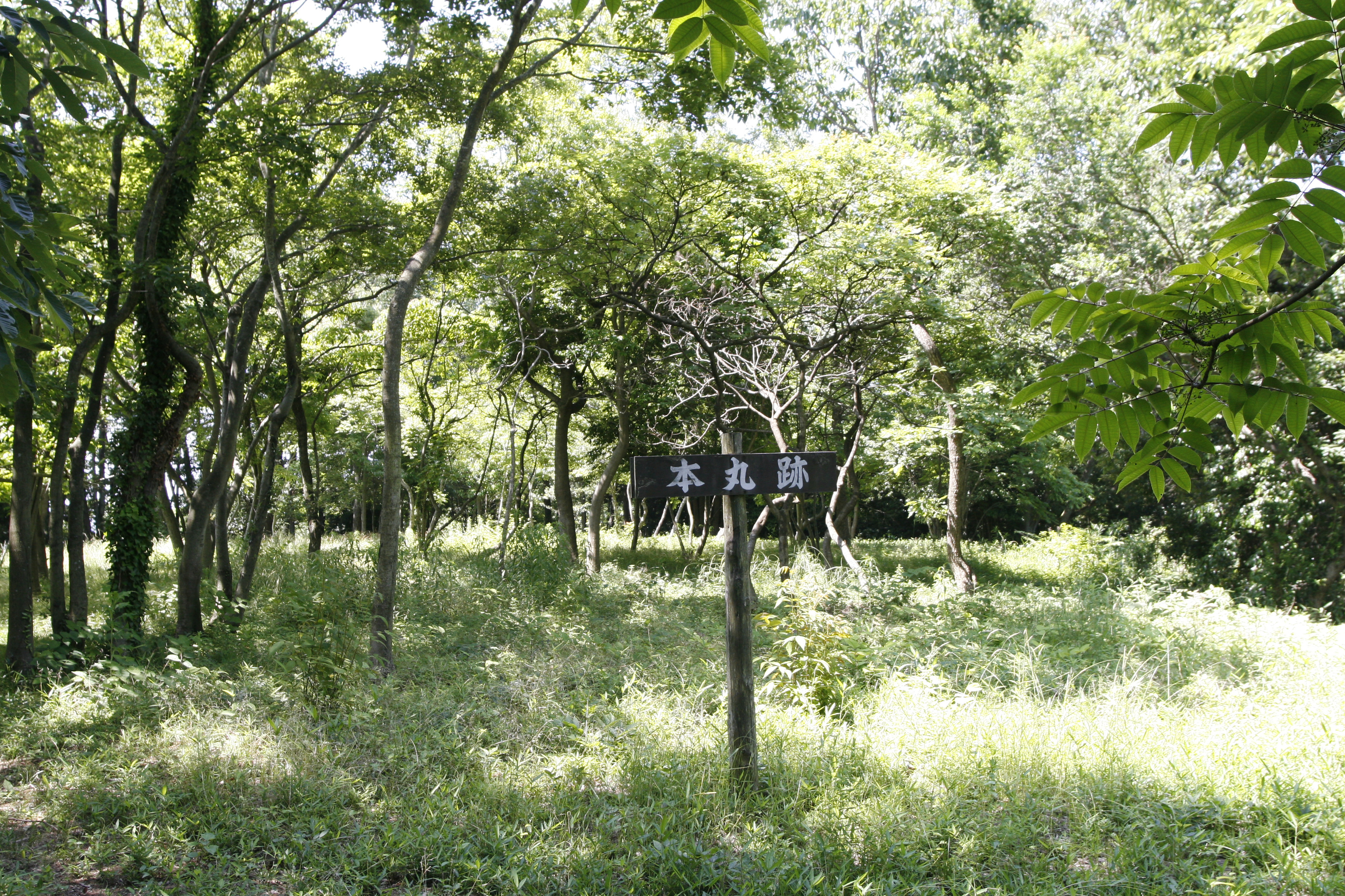 高山城本丸跡